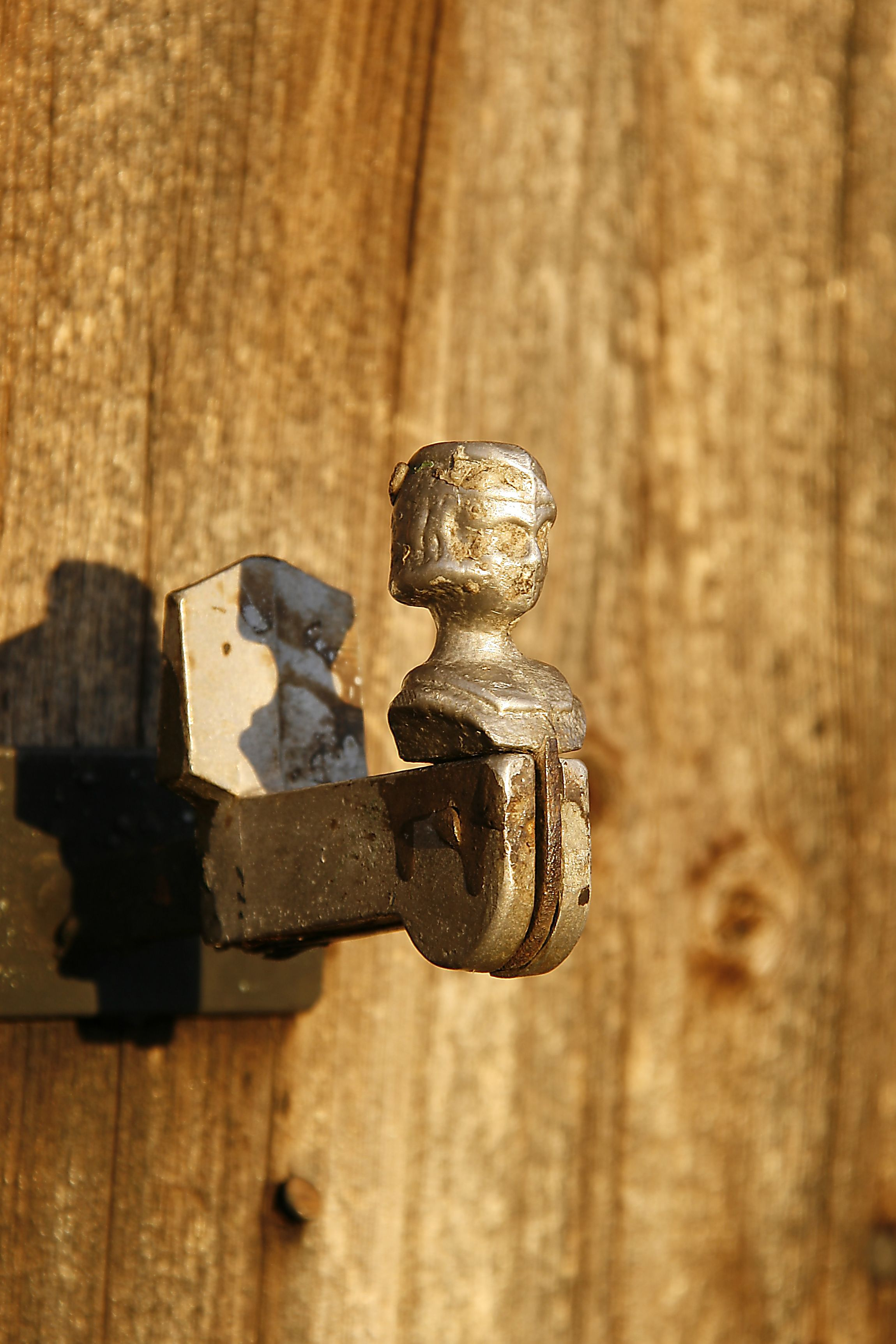 Nach Bregenzerwälder Mundart Gadaladalällar - Halteknauf des Fensterladen an der Fassade auch Studentenkopf genannt. Gada - das elterliche Schlafzimmer; Lada - Fensterladen; Lällar - Zunge